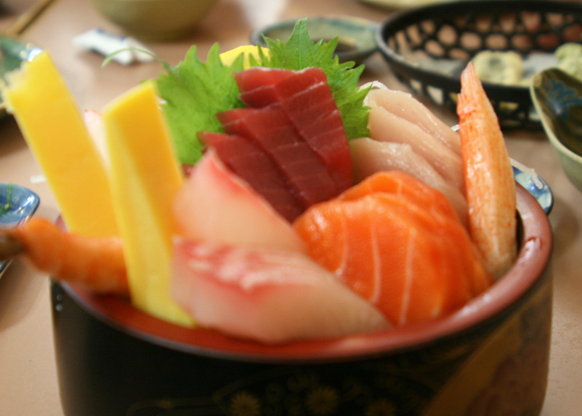 Chirashizushi